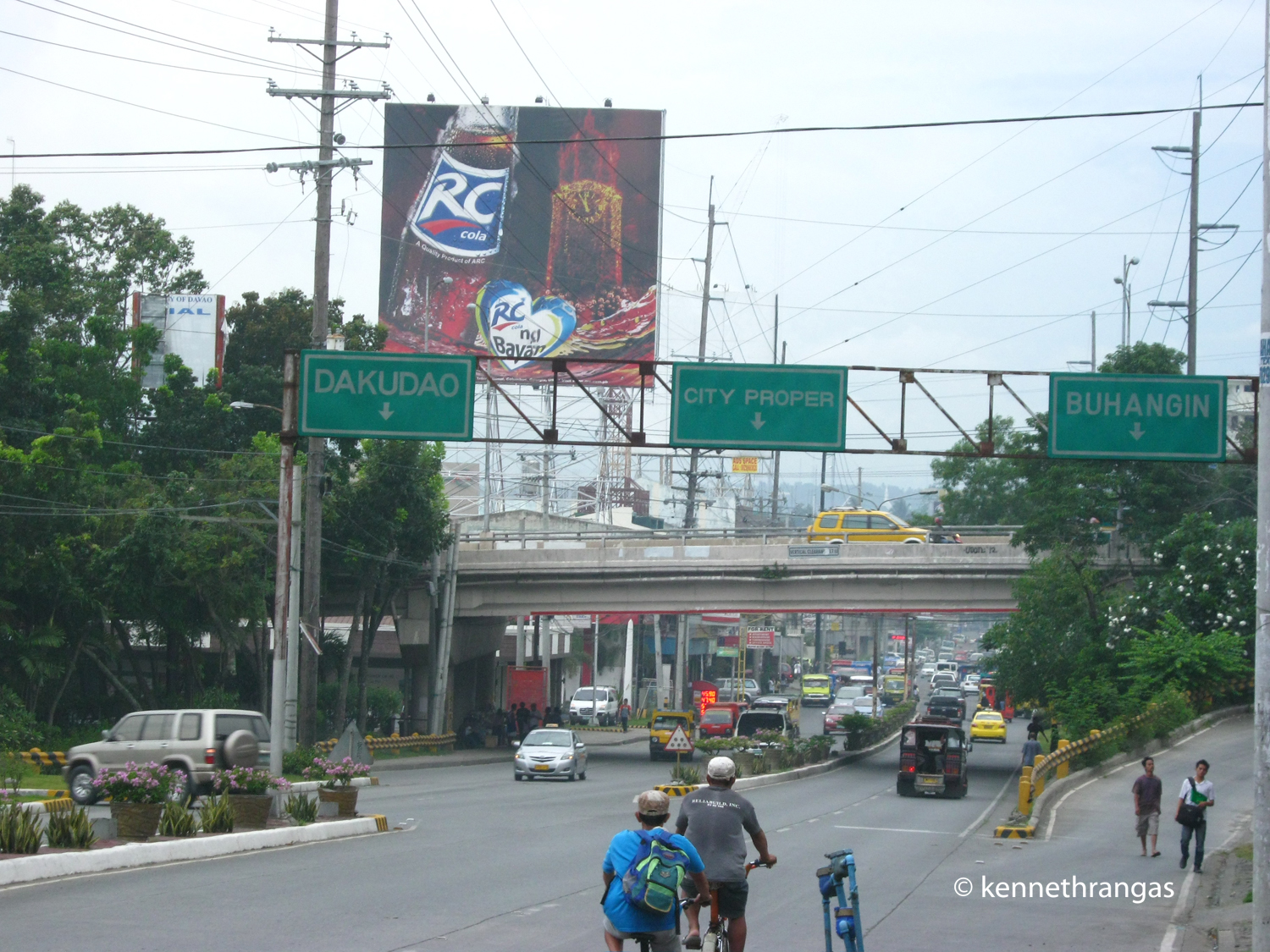 Bajada, Davao City